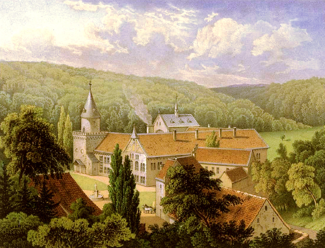 Kloster Böddeken in Büren, Kreis Büren, Provinz Westphalen, Germany